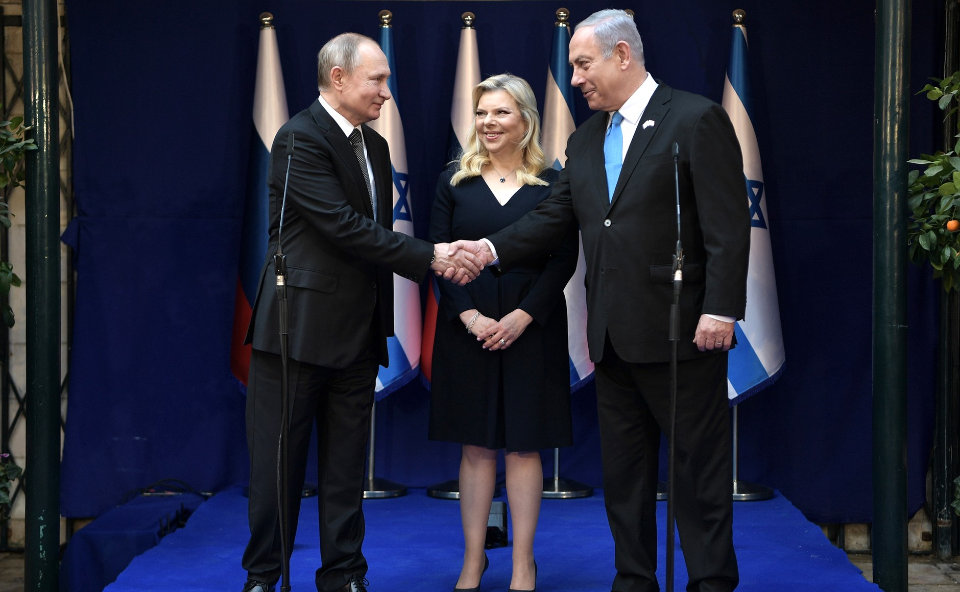 С Премьер-министром Израиля Биньямином Нетаньяху и его супругой Сарой Нетаньяху.